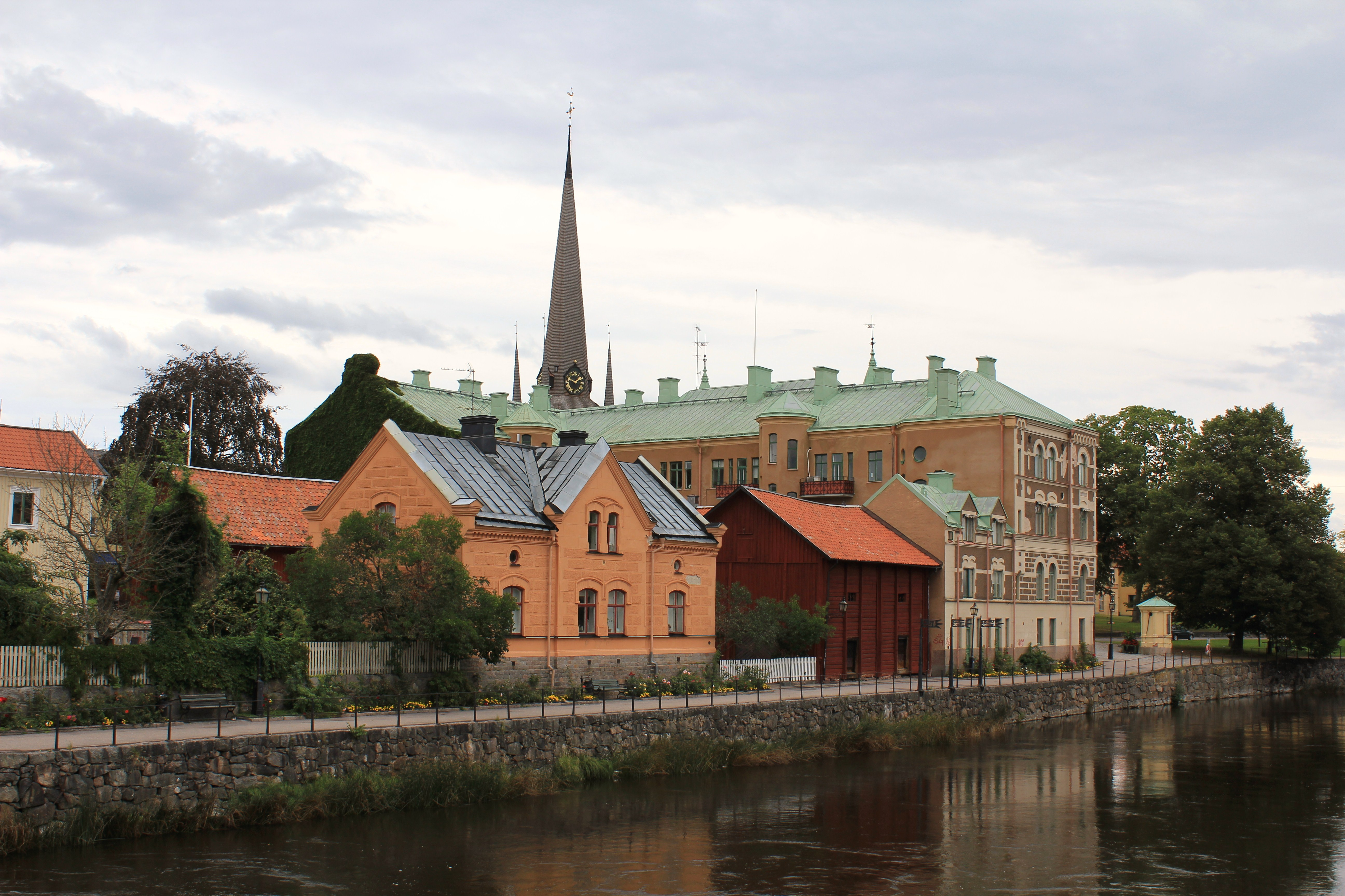 Arboga. Bild tagen från Gamla bron. Det gula stenhuset är Kungsgården 5, husnummer 2. De röda trähusen intill och bakom hör också till Kungsgården.